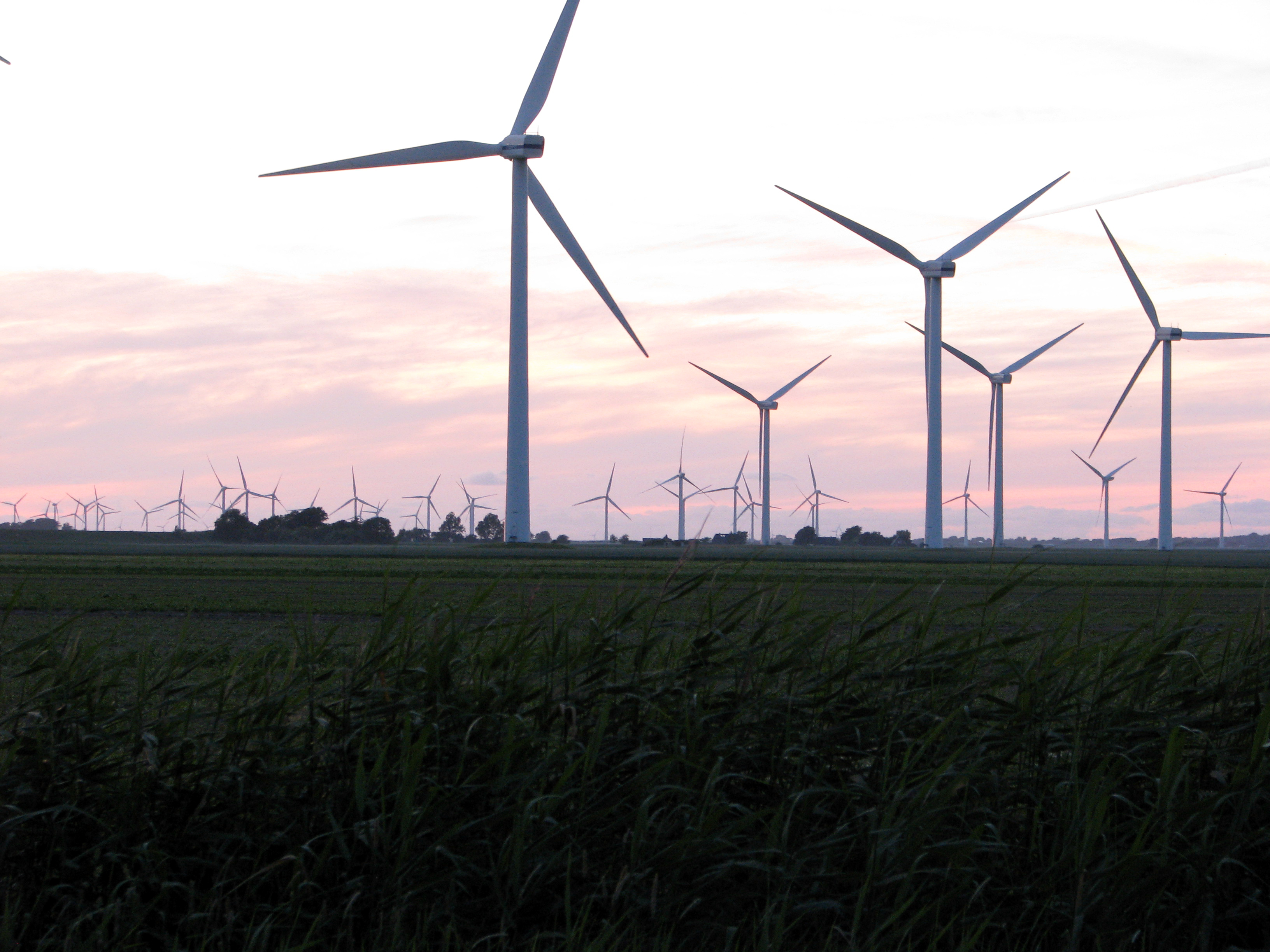 Die landschaftliche Prägung der Gemeinde Reußenköge erfolgt heute durch die Vielzahl von Windenergieanlagen. Hier die Blickachse aus dem Desmerciereskoog (Aufnahmestandort) in Richtung Nordwesten